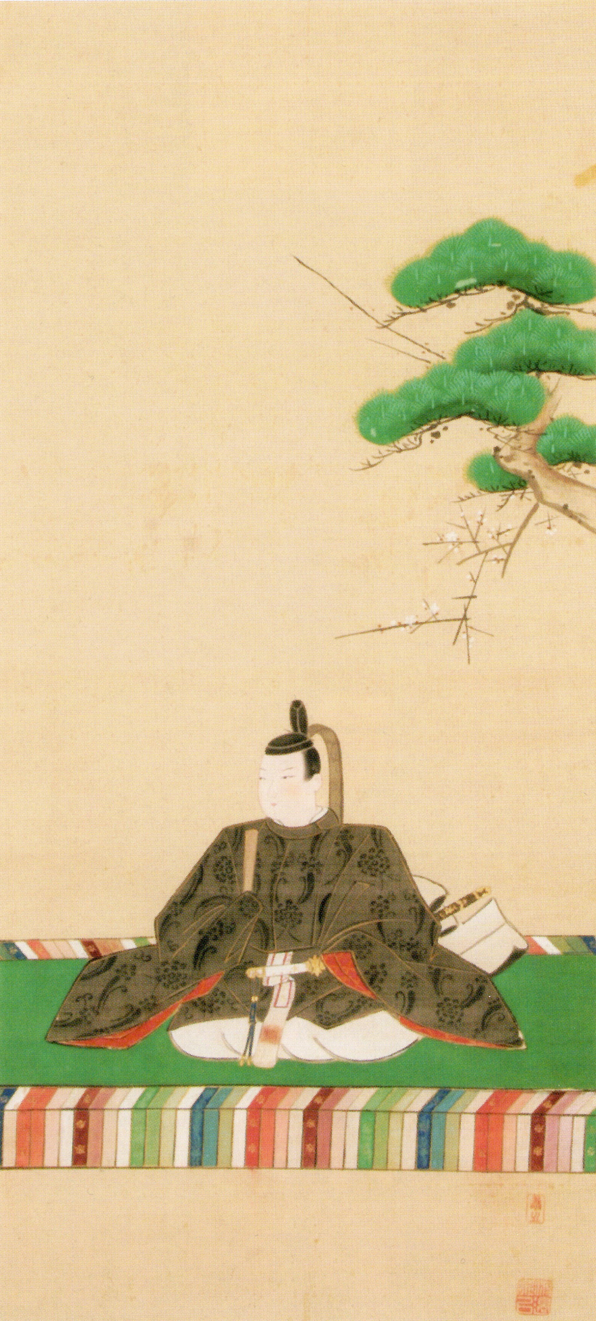 前田宗辰の肖像。